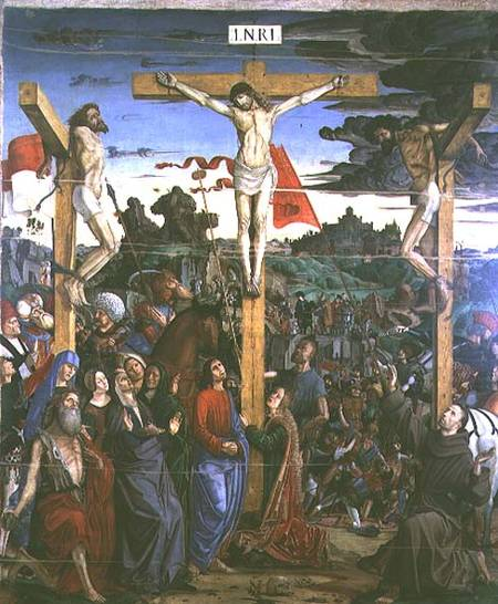 Crucifixion